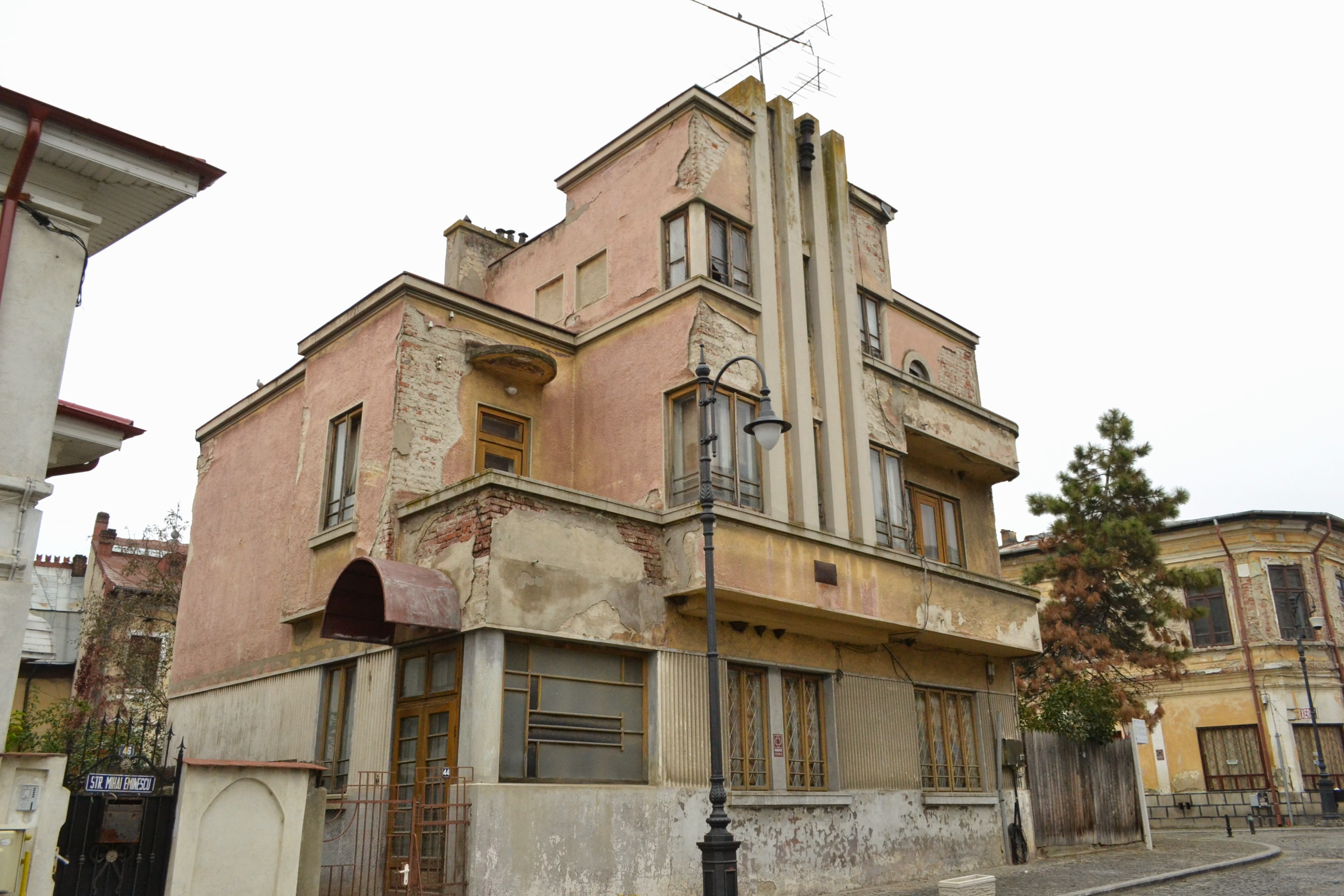 Casa Eltin din Slatina, în 2014.